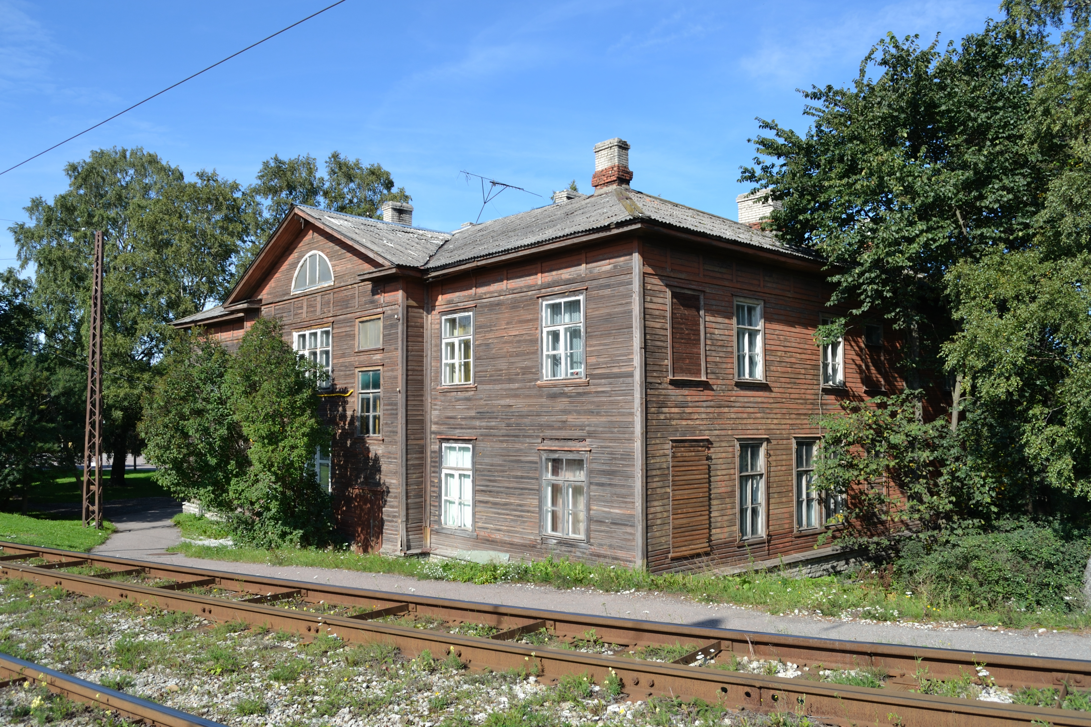 Tallinn, Vene-Balti laevatehase politseijaoskond, 1914